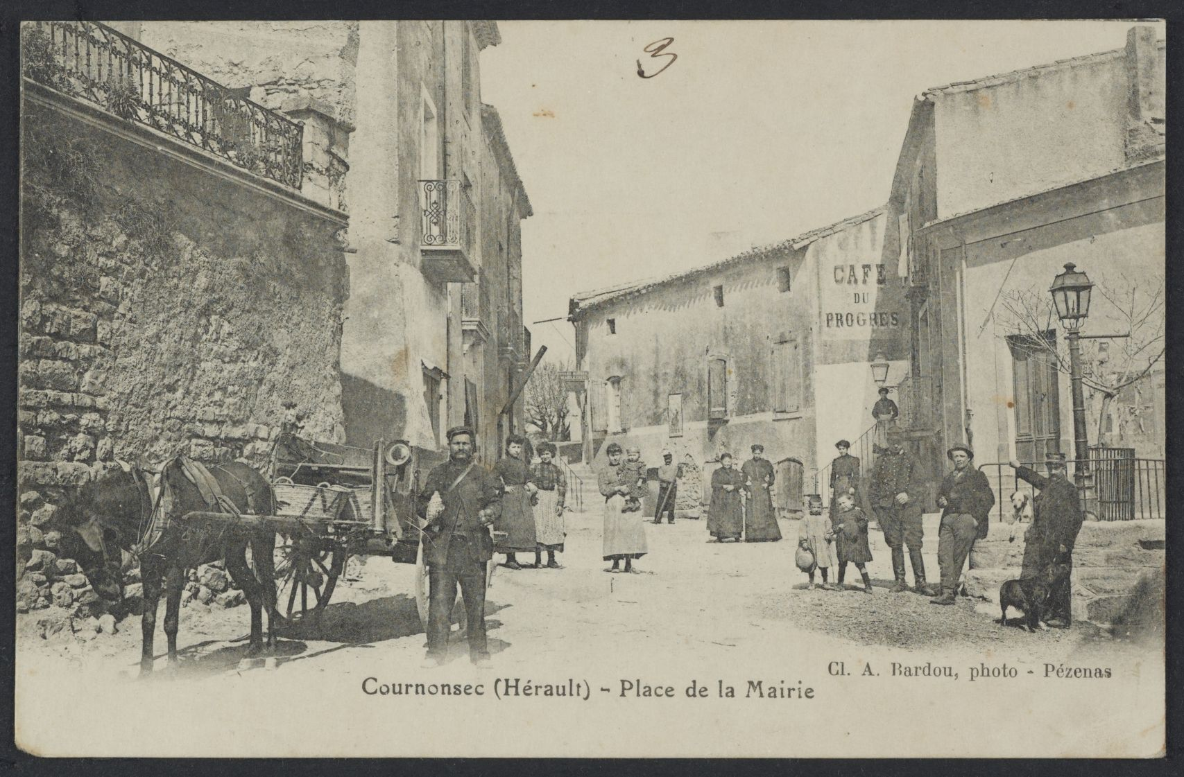 Cournonsec. - Place de la Mairie, 1ère moitié du XXe siècle